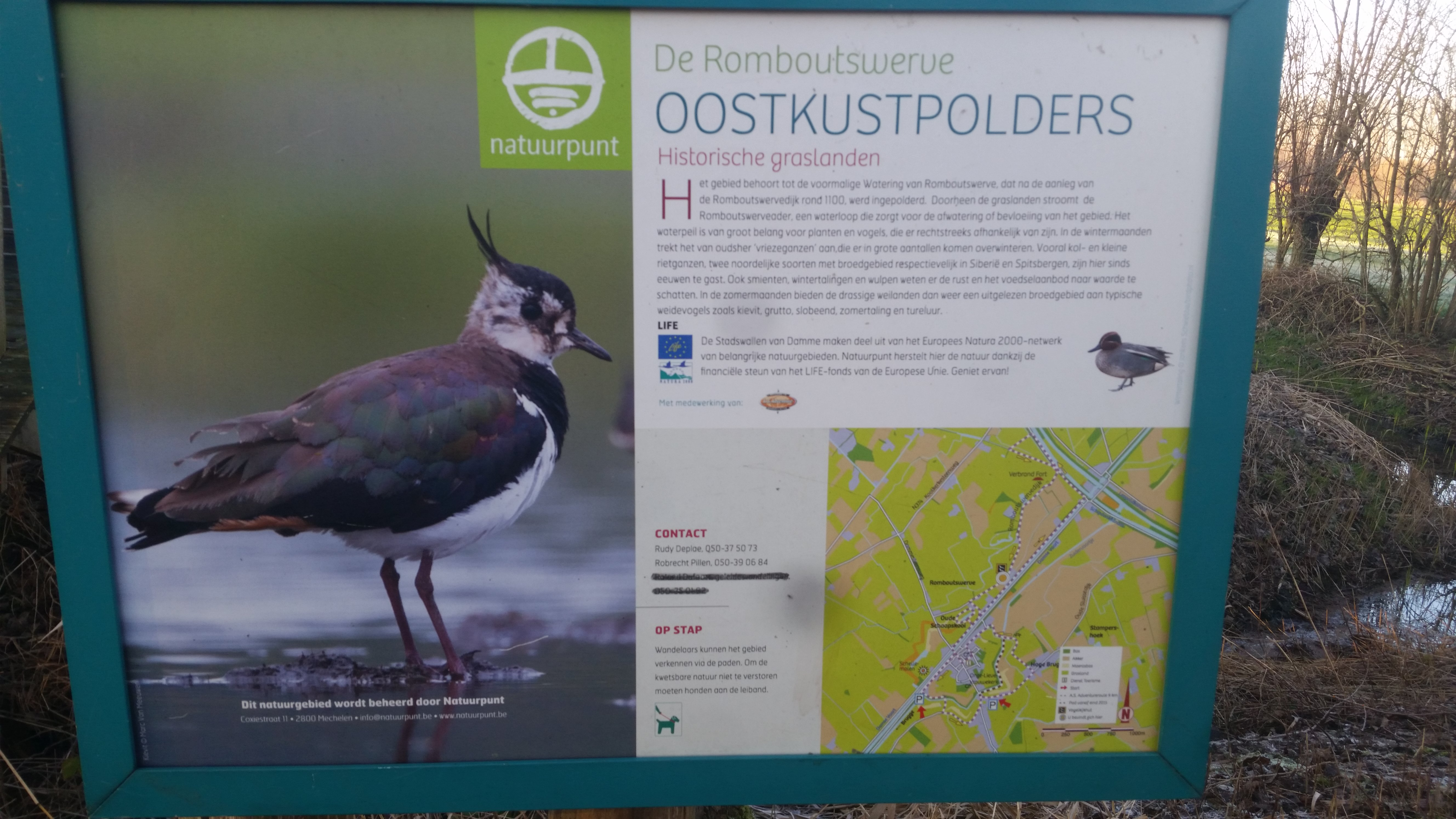 Dit informatiebord beschrijft de natuurwaarde van de Oostkustpolders in het natuurreservaat de Romoutswerve